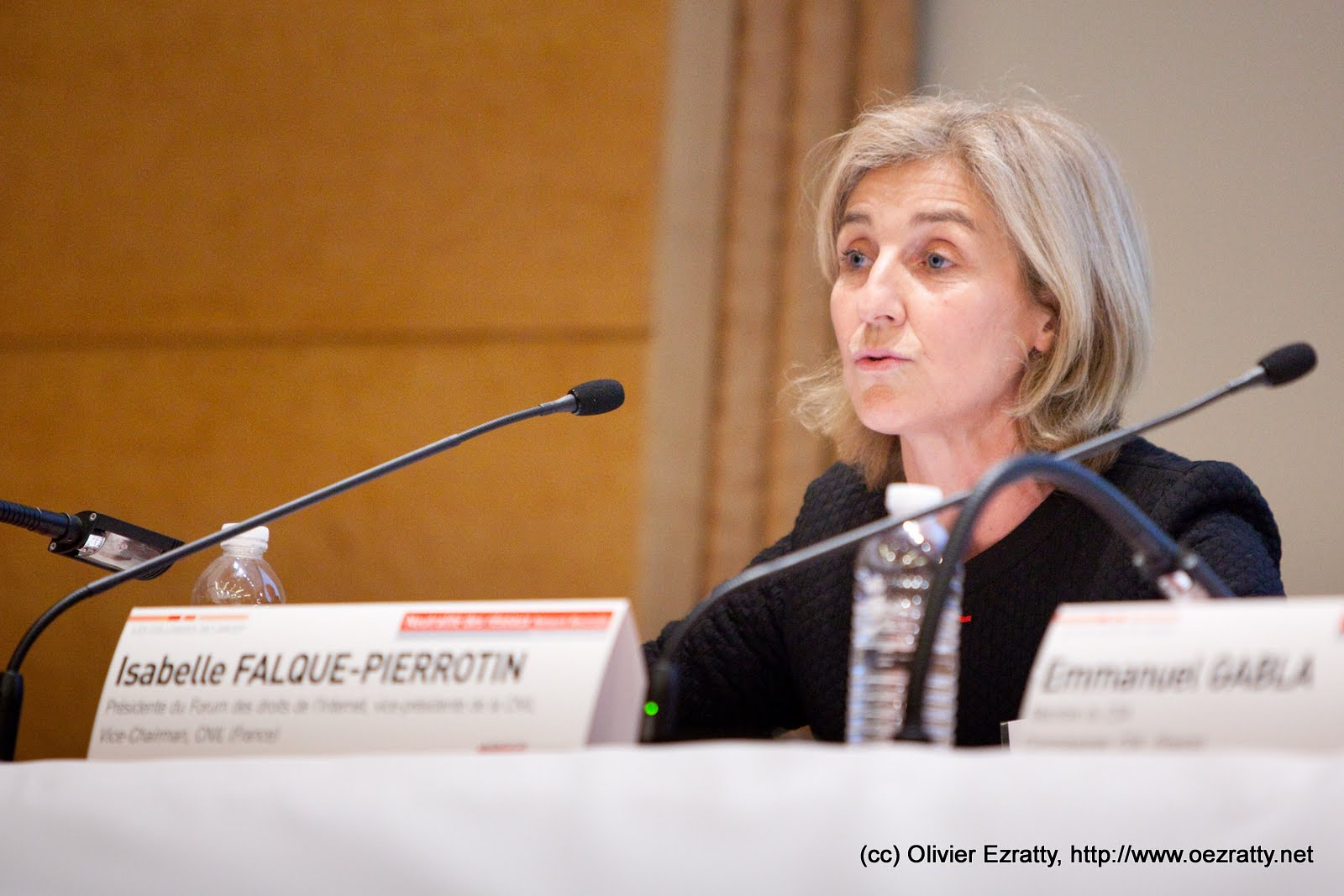 Isabelle Falque-Pierrotin lors du colloque ARCEP Neutralité des Réseaux